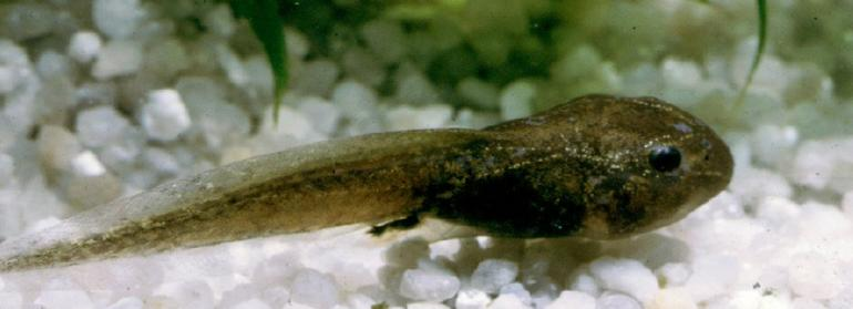 Pelodytes punctatus